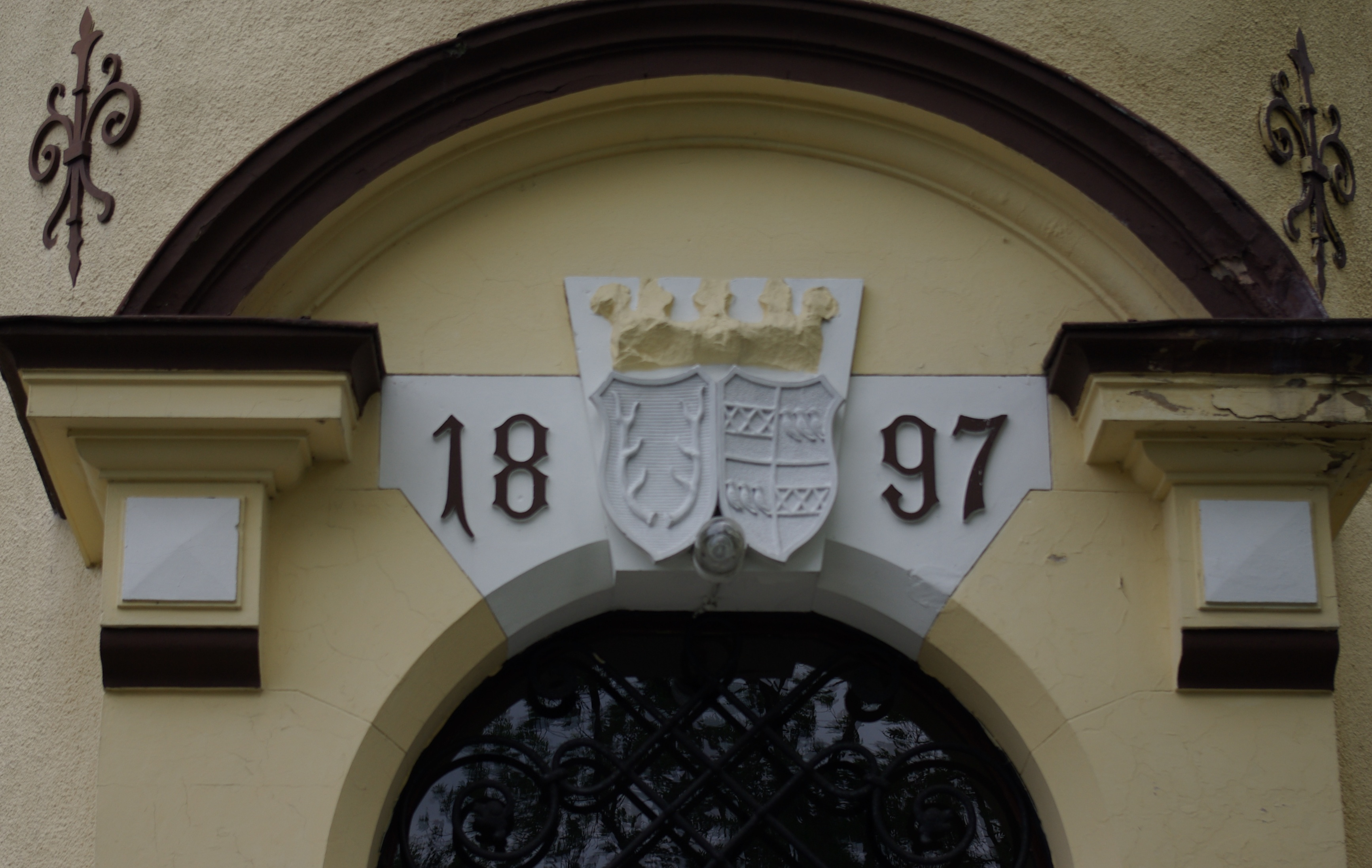 Rogi Zamek, województwo opolskie